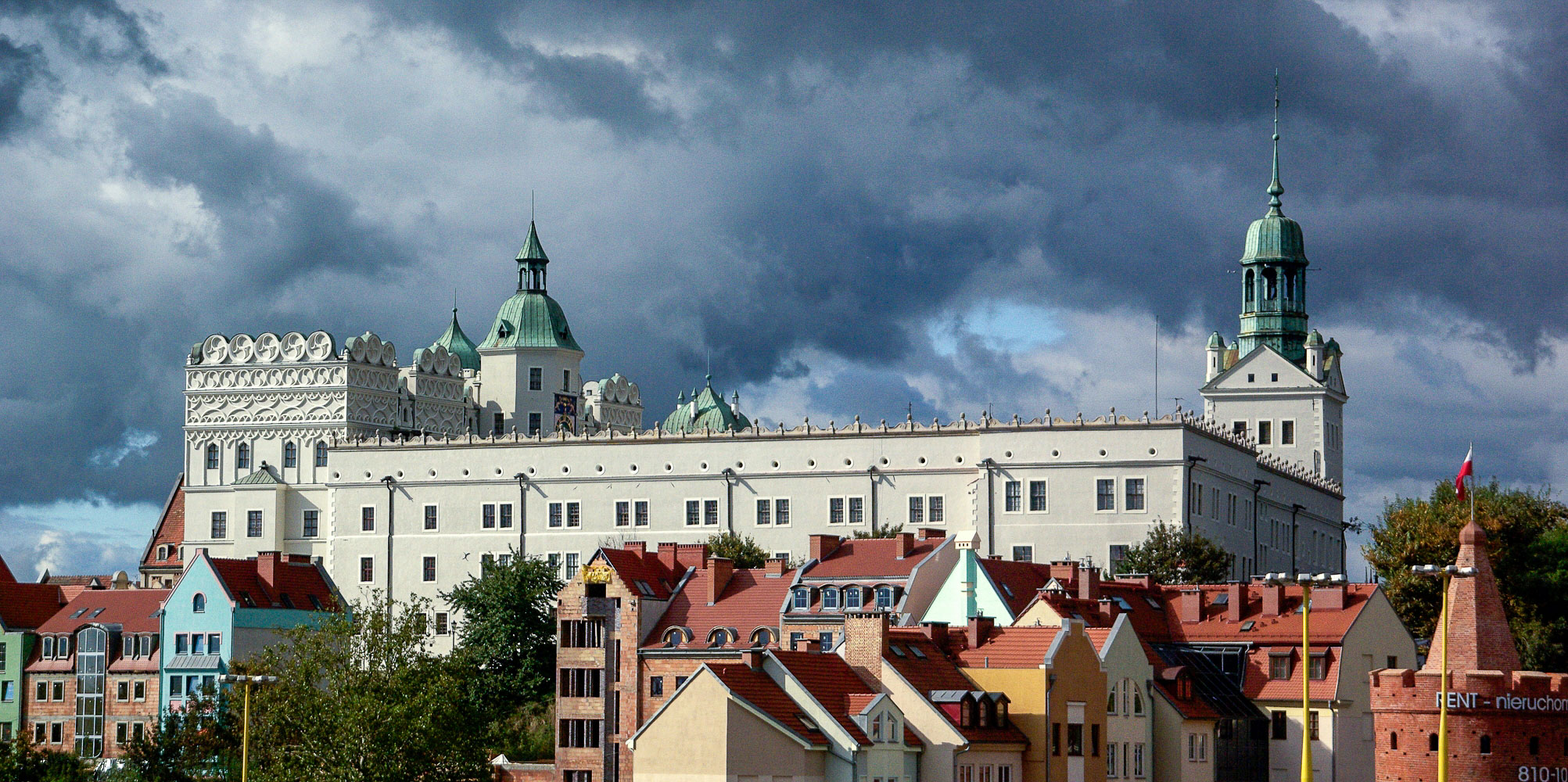 Widok na Zamek z Trasy Zamkowej